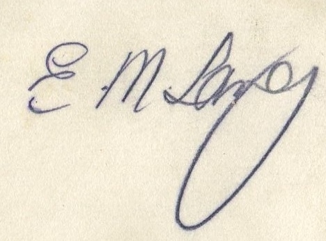 Autogramm des Karikaturisten Ernst Maria Lang